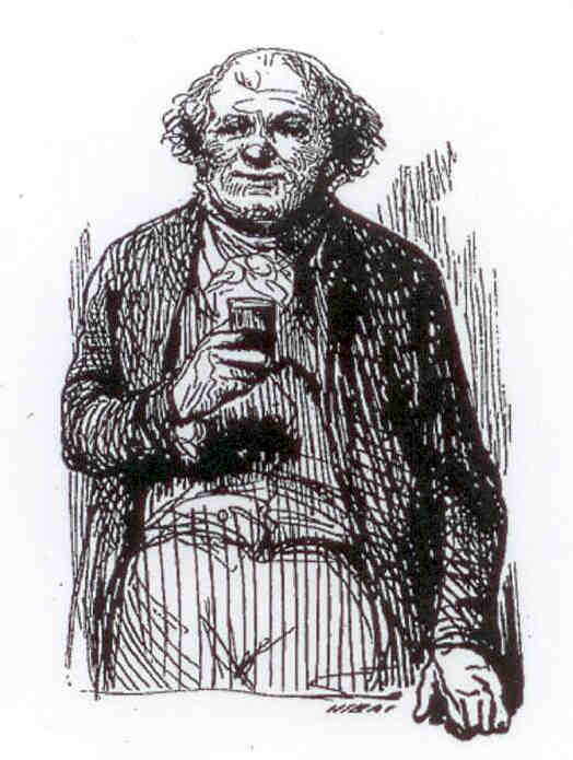 Portrait de Simar dit : Père Simar, goguettier et fondateur de la célèbre goguette parisienne la Mère Goguette.